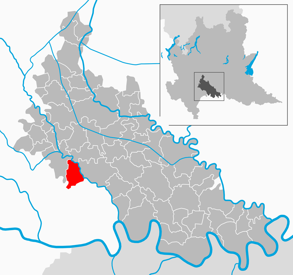 Il comune di Graffignana nella provincia di Lodi